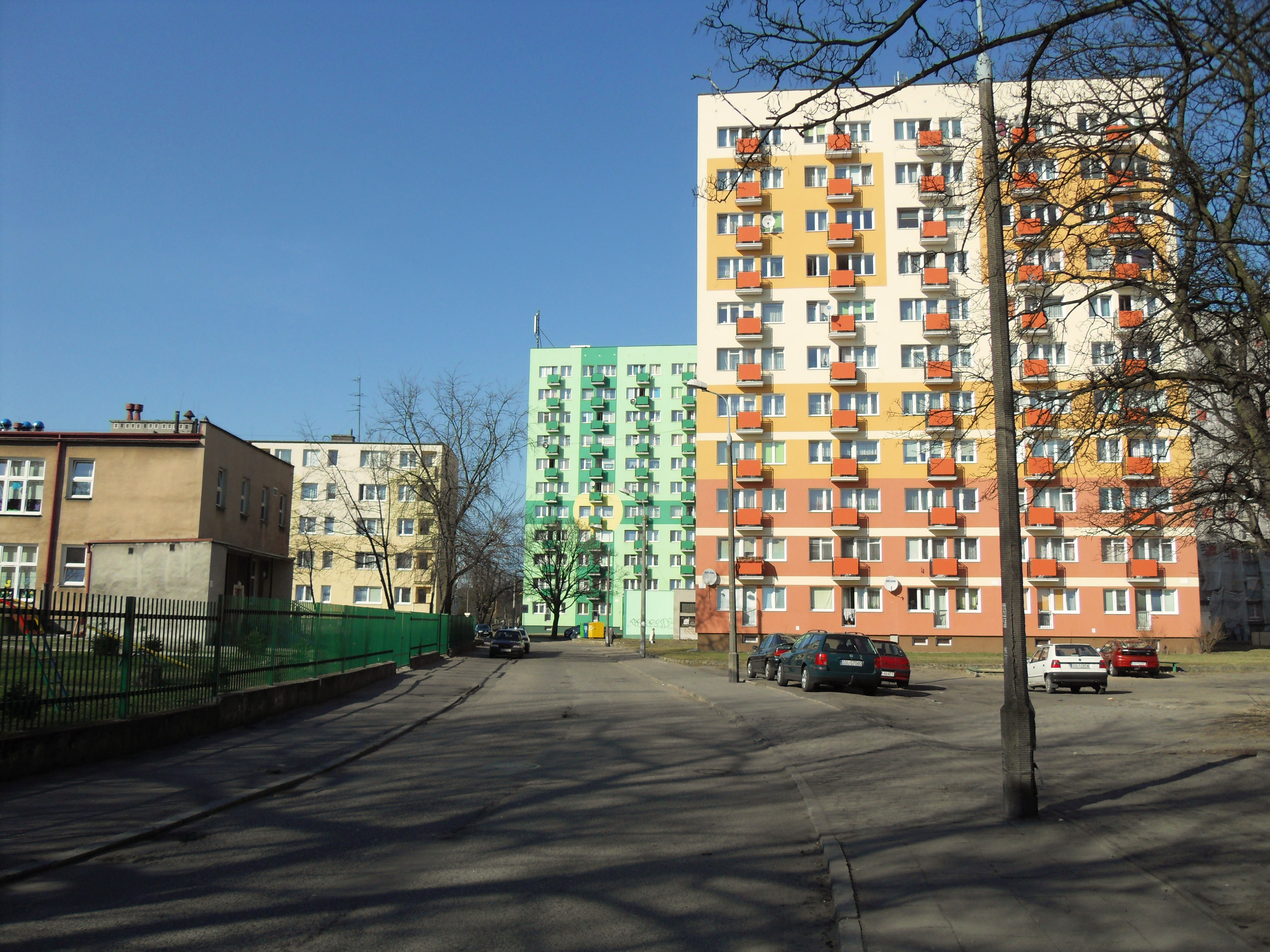 Gdańsk Stogi, ul. Szpaki.